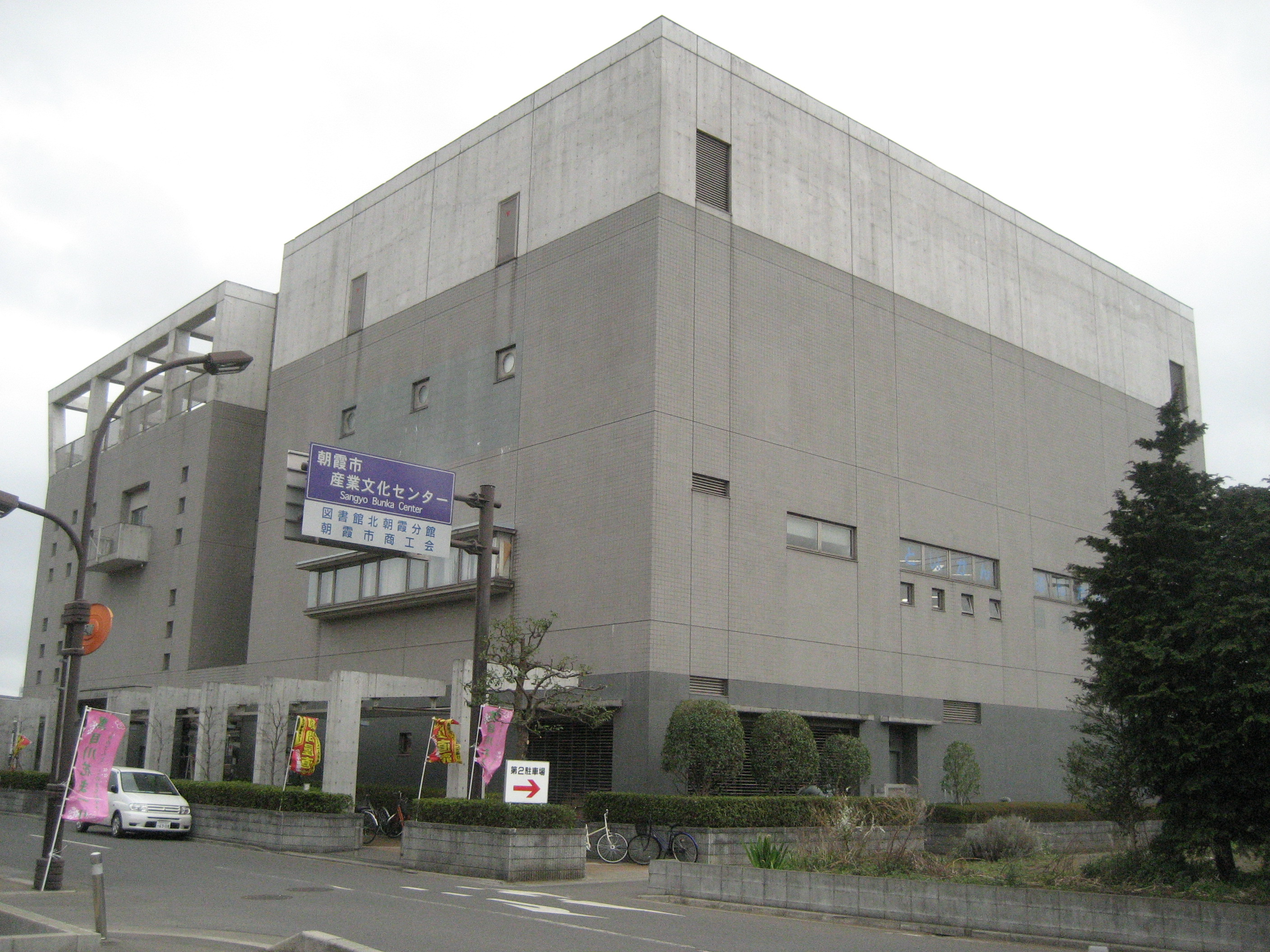 朝霞市産業文化センター